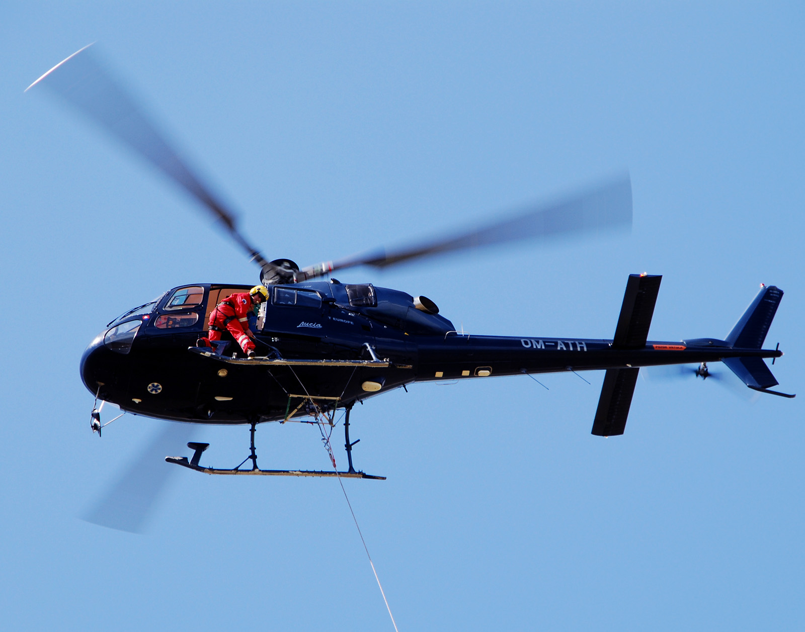 Ecureuil AS 355N OM-ATH popradskej spoločnosti Air Transport Europe , Slovakia